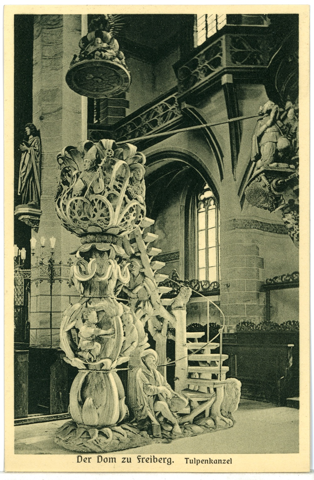 Freiberg; Im Dom - Tulpenkanzel This postcard is from publisher Brück & Sohn in Meißen ( postcard has a unique number 08496 and is available in a higher resolution at the publisher. This images was uploaded in a cooperation project between Wikipedians and the publisher.